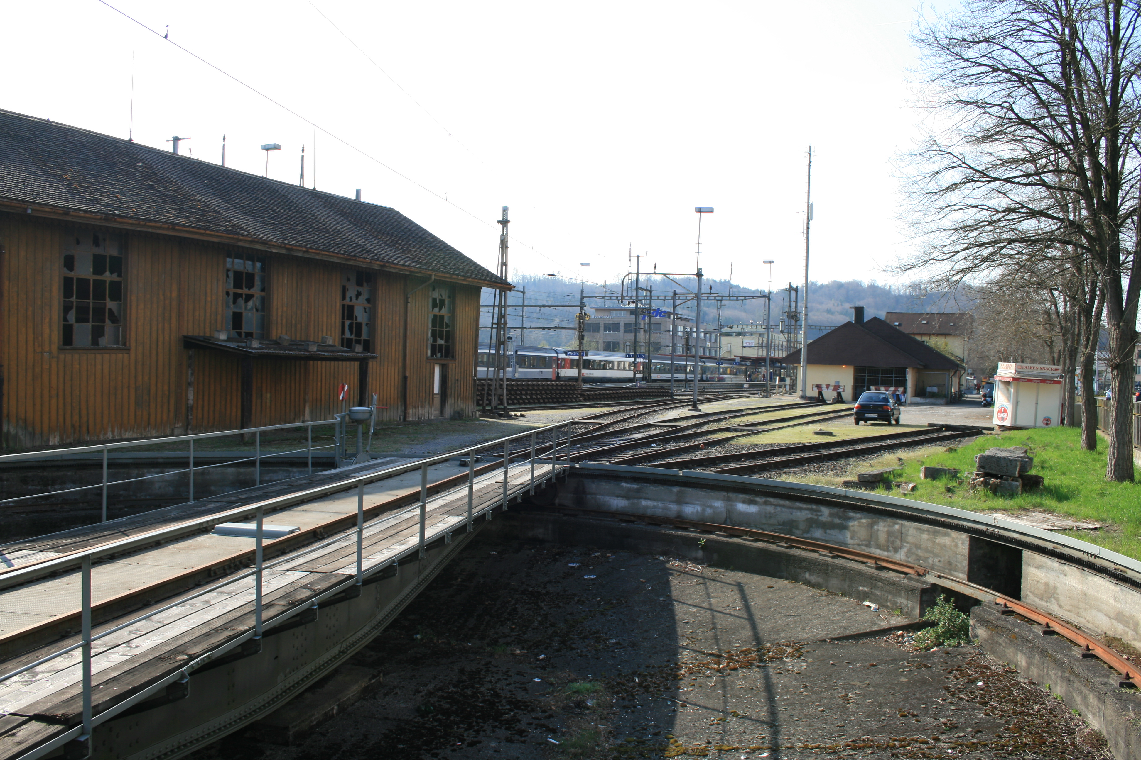 Bahnhof Wettingen, Schweiz